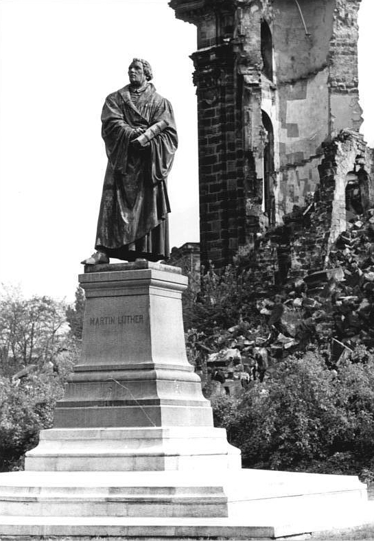 Dresden, Luther-Denkmal ADN-ZB Häßler 5.5.1983 Dresden: Lutherstandbild- Nach der Erneuerung des Sockels durch den VEB Elbnaturstein befindet sich jetzt das Lutherdenkmal vor der Ruine der Frauenkirche im Zentrum der Stadt. Es wurde Ende des vorigen Jahrhunderts nach einem Entwurf des Bildhauers Rietschel in Dresden gegossen.